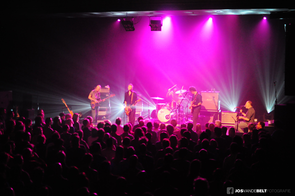 Op 15 augustus 2013 maakte de band bekend in 2014 een nieuwe tour te plannen, ter ere van de heruitgaven van hun albums.[3] De CD-box Daryll-Ann Again werd in december 2013 uitgebracht en bevat alle uitgebrachte albums van de band, aangevuld met demo's en bijzondere uitgaven. Aanvullend deed de band in de eerste maanden van 2014 diverse optredens in de meest bekende bezetting met drummer Kleijn en bassist Vos. In deze samenstelling deden ze ook een verrassingsoptreden op Noorderslag 2014